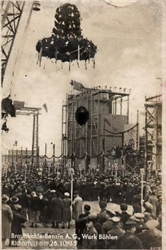 Richtfest Braunkohle-Benzin-Werk Böhlen 26.10.1935